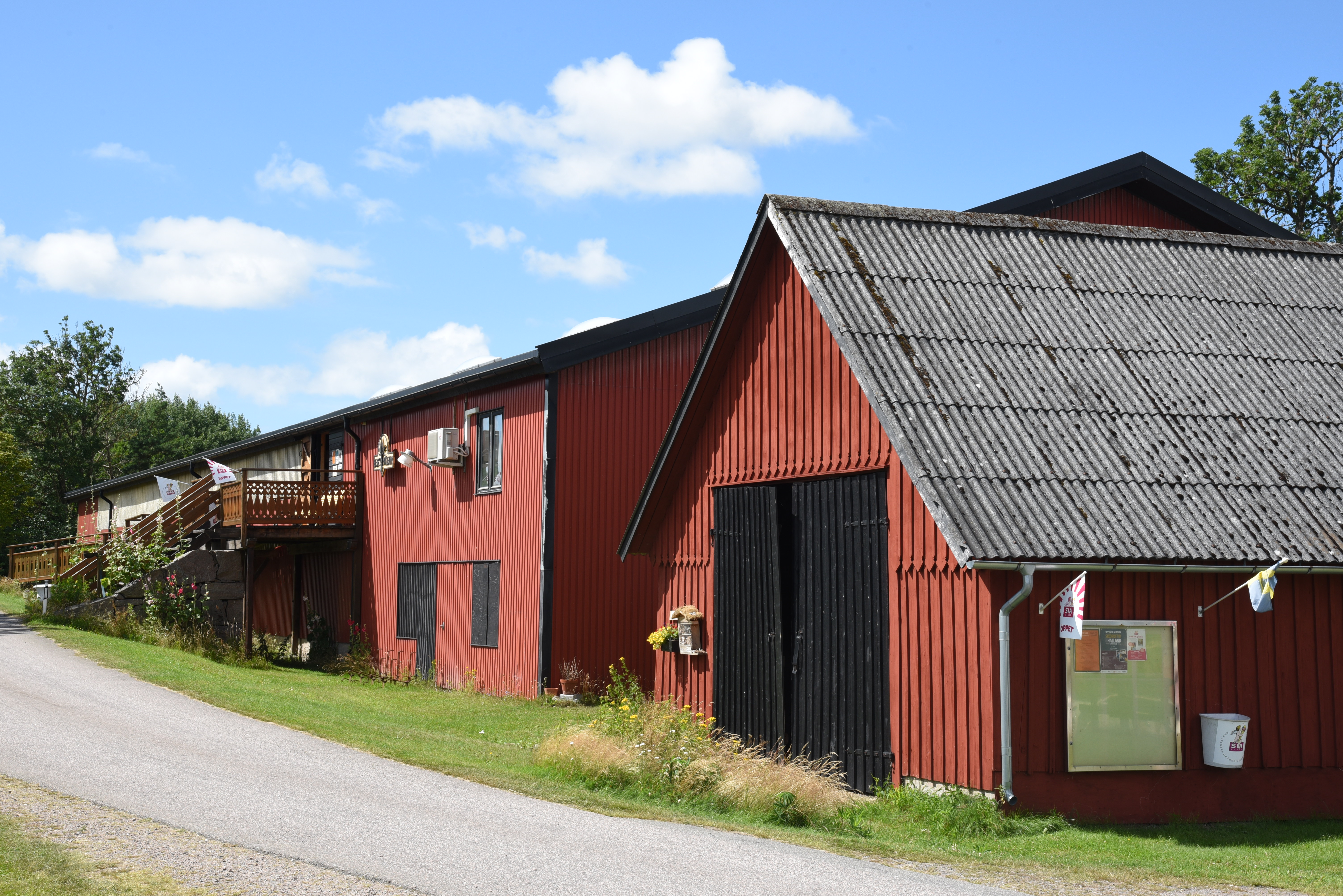 Berte museum i Slöinge, Falkenbergs kommun, Halland.